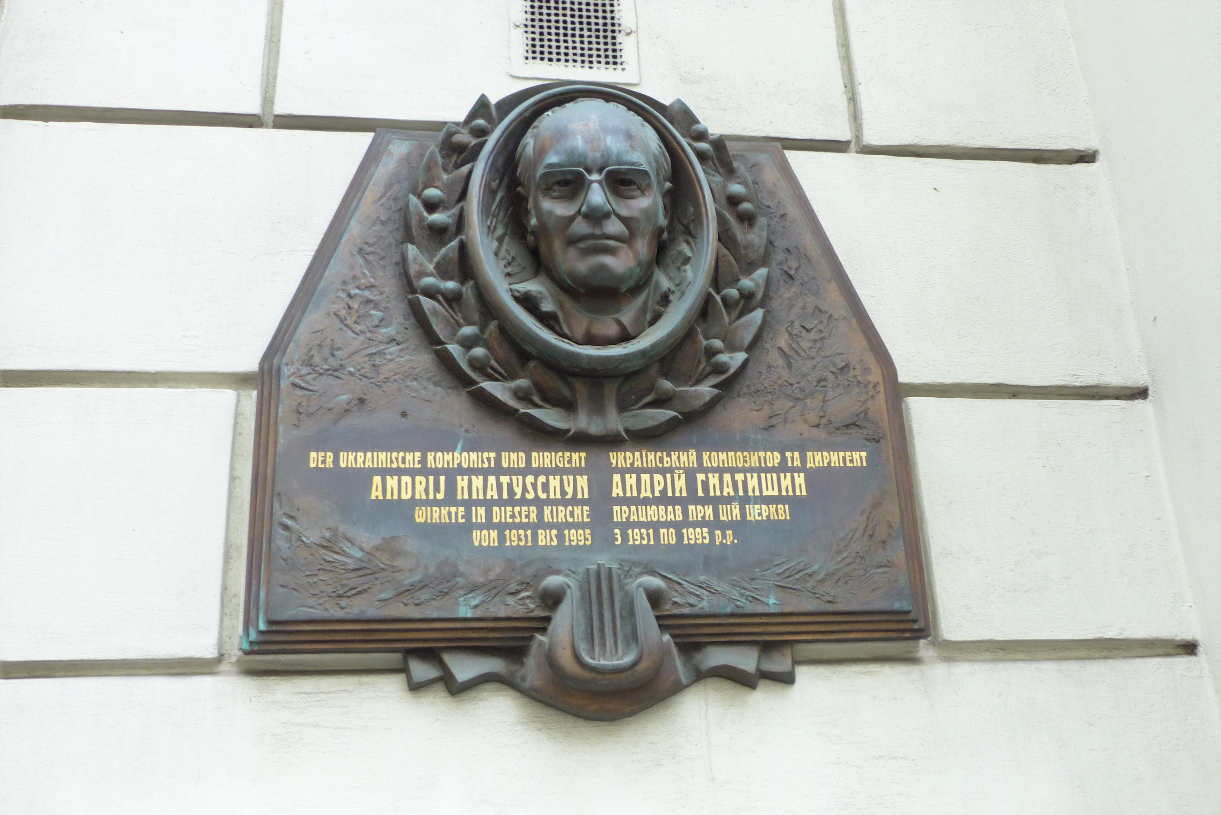 Gedenktafel für den ukrainischen Komponisten und Dirigenten Andrij Hnatyschyn (1906 - 1995) an der St. Barbara Ukrainisch-Griechisch-Katholischen Kirche in Wien 1010, Postgasse 8 (